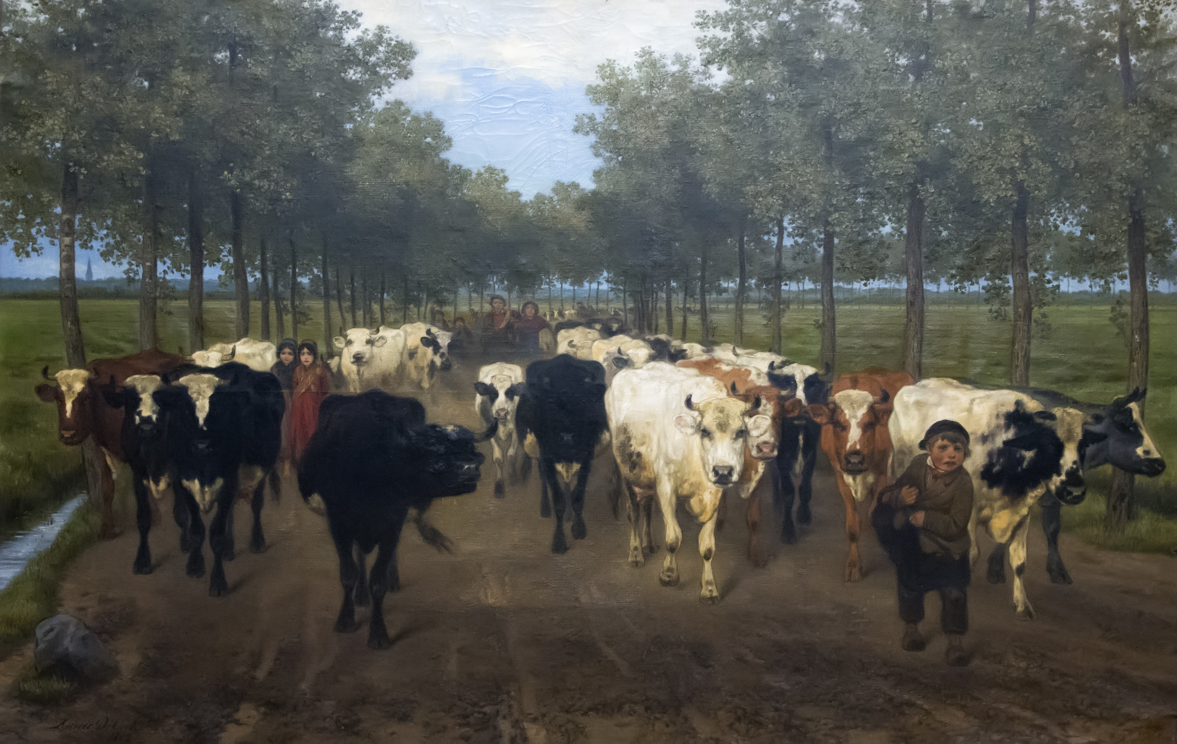 Xavier de Cock (1818-1896) De Meersstraat in Gent (1862) MSK Gent